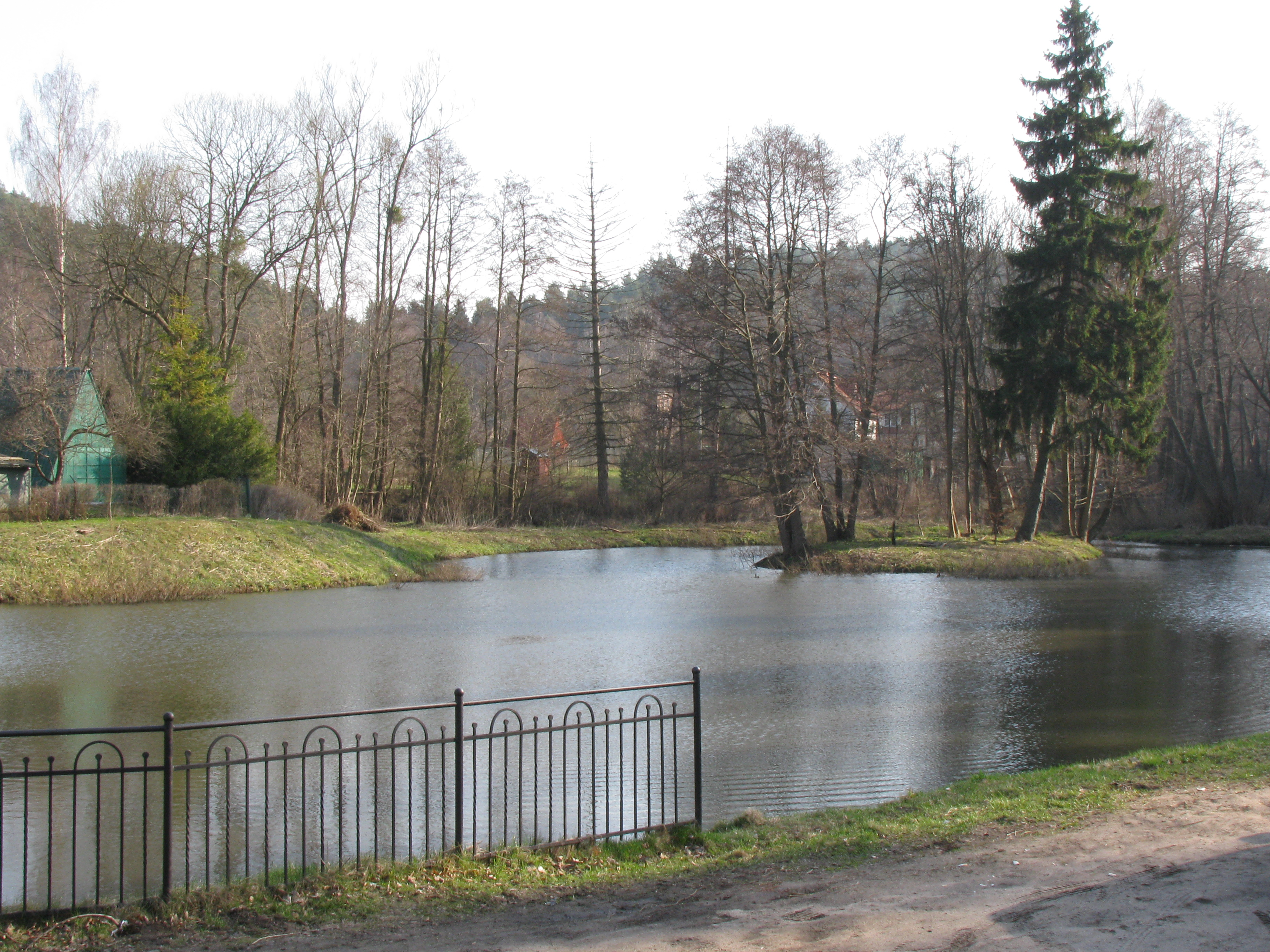 Dolina Schwabego w Oliwie, staw na Potoku Oliwskim (zbiornik retencyjny "Bytowska 4").